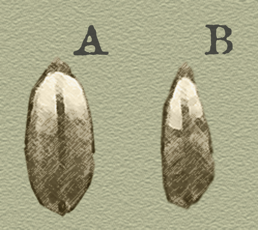 Confronto fra un chicco di grano sano (A) ed uno rachitico a causa della "stretta" (B)